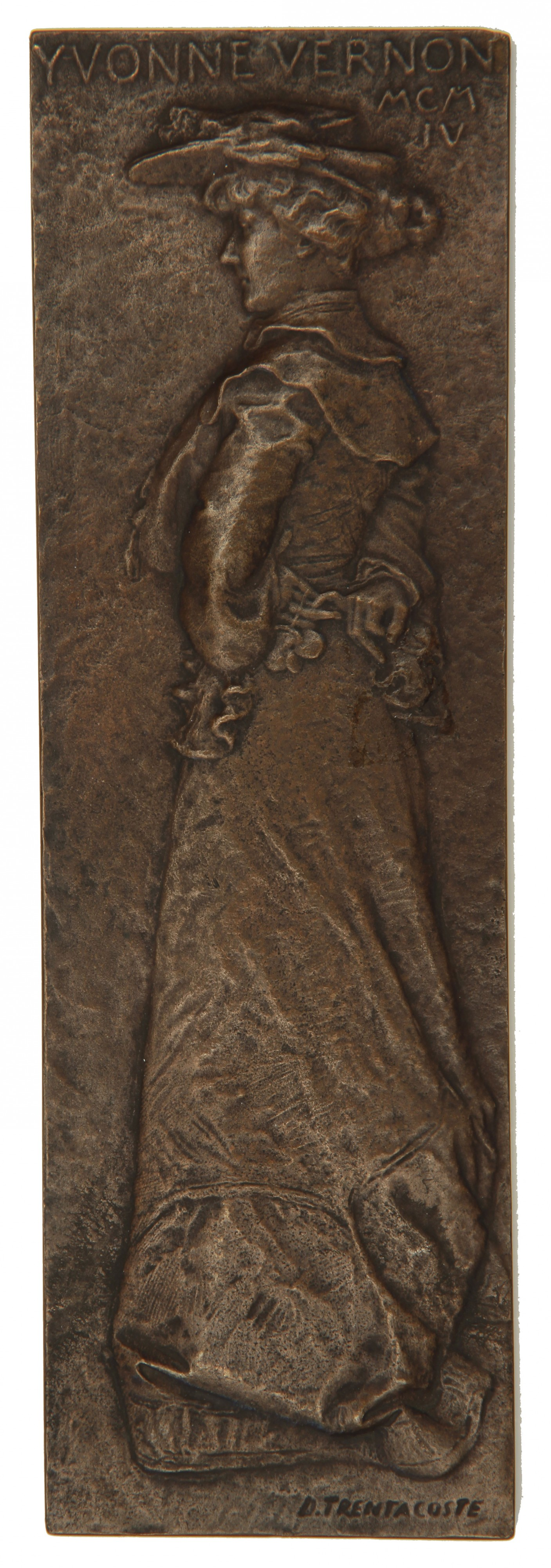 Domenico Trentacoste, Yvonne Vernon. 1904. 14,2 x 4,2 cm, modelado y vaciado bronce. Inv. 11228.